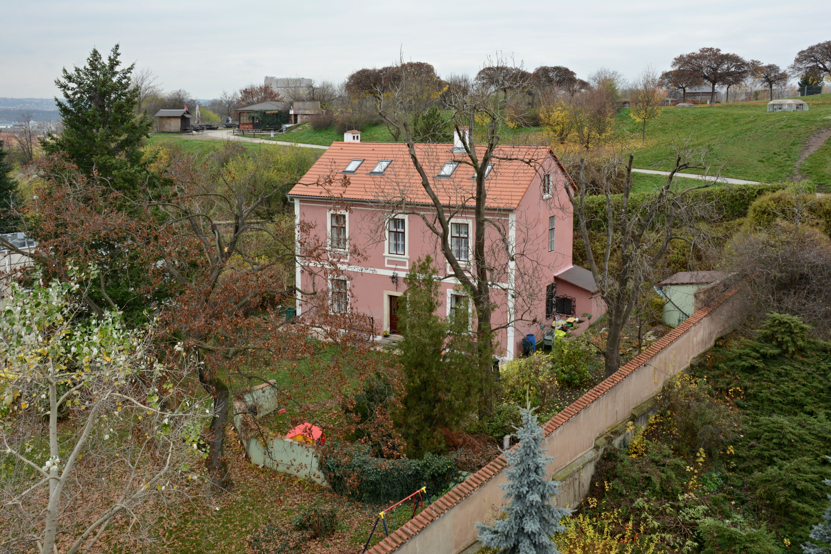 Rodinný dům S. K. Neumanna, Praha 3, Chelčického 45/41, Žižkov, Žižkov.